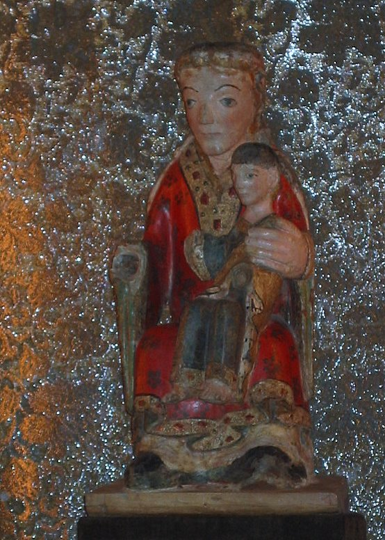 Een foto van het Mariabeeldje uit de elfde eeuw in de kerk van Bertem